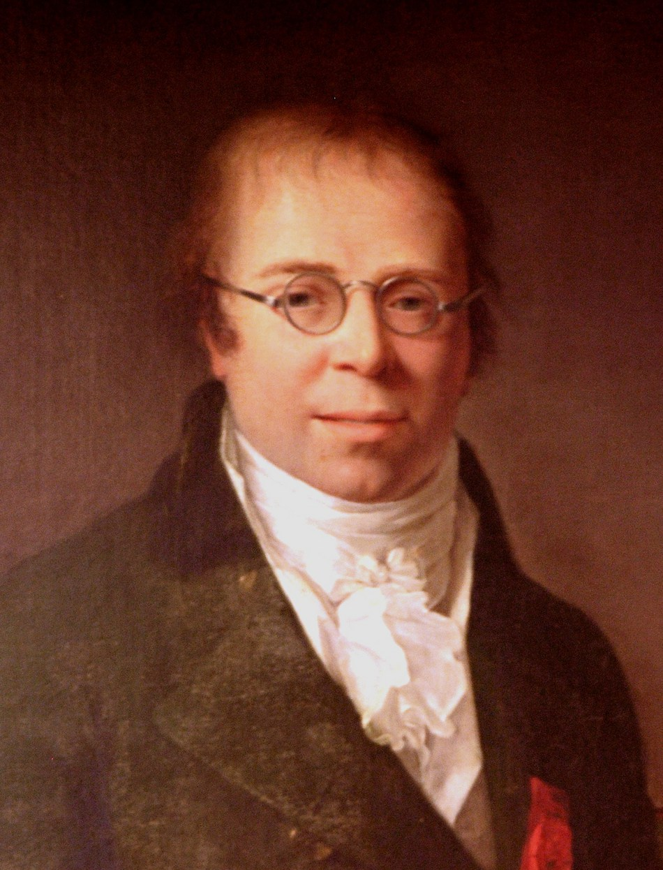 portrait du premier préfet des Deux-Sèvres, officier de la légion d'honneur, baron